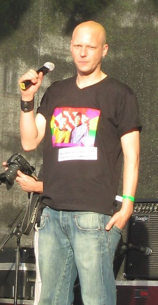 Marco Schreuder at the Regenbogenparade-Celebration 2007